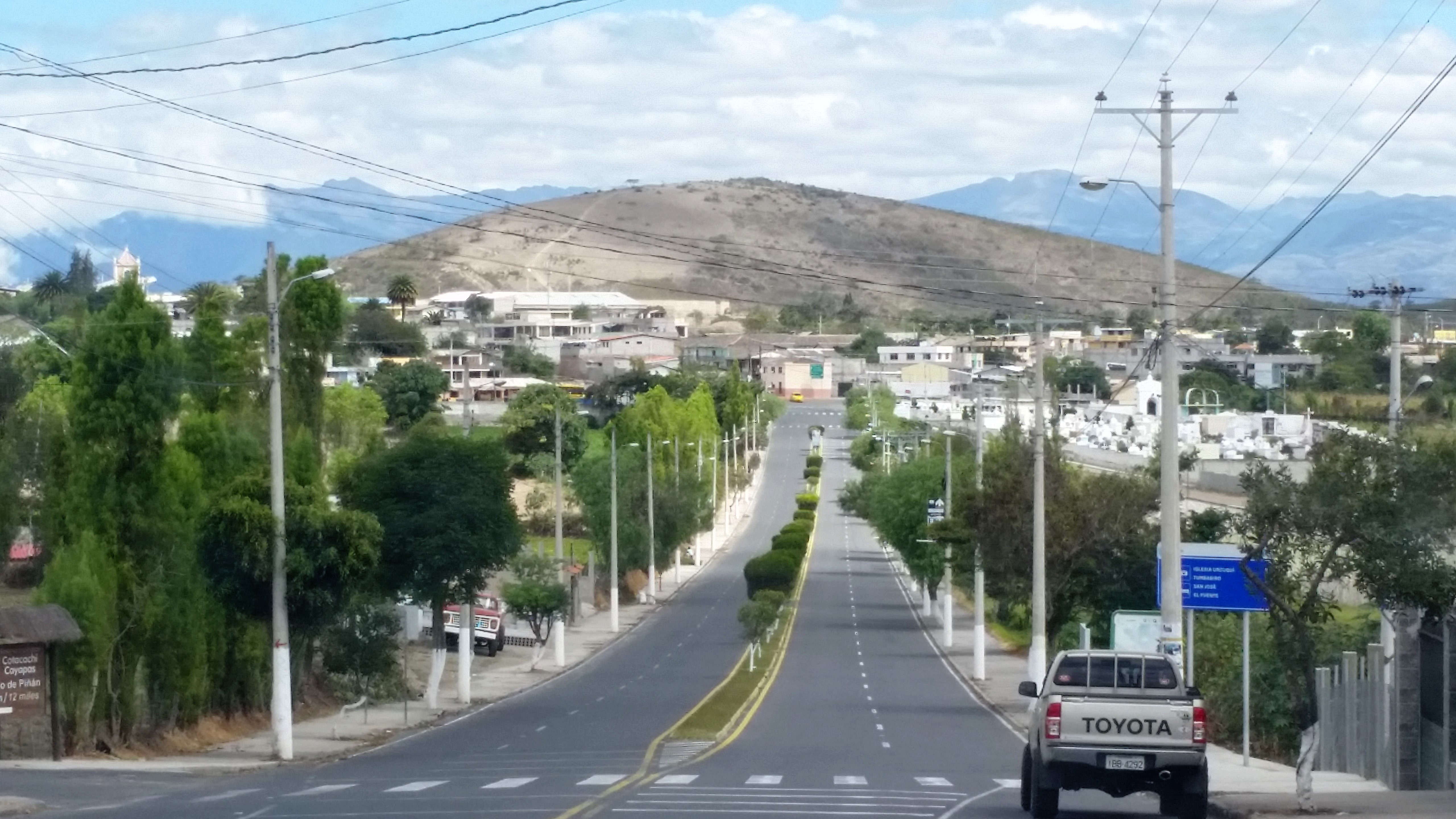 Entrada a San Miguel de Urcuquí (Provincia de Imbabura)